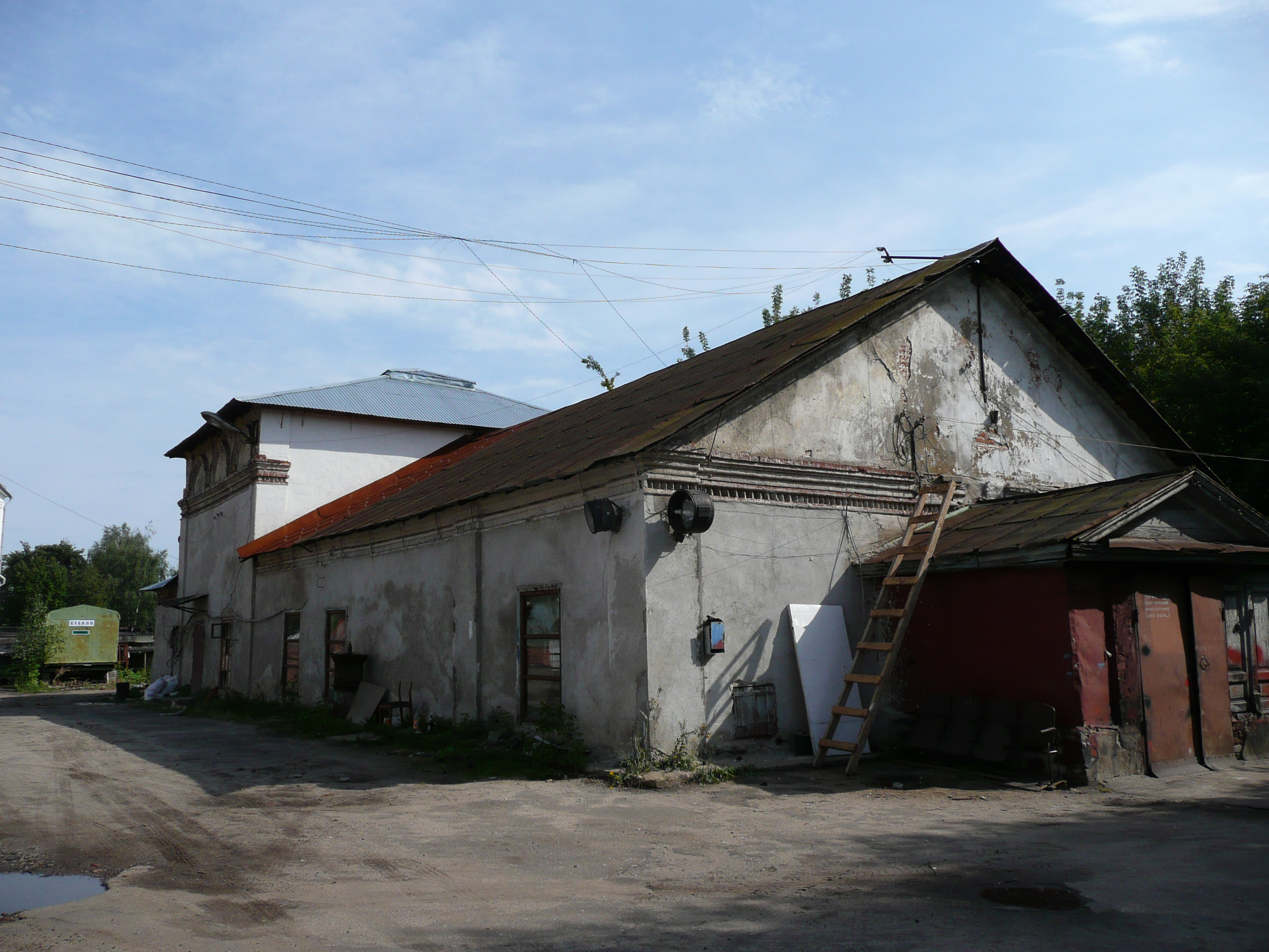 Церковь Космы и Дамиана: улица Кооперативная, 2, Ярославль, Ярославская область